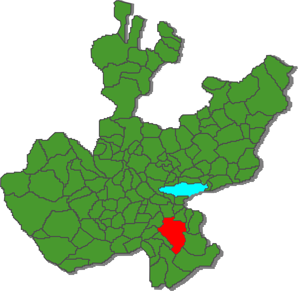 Mapa de ubicación del municipio " Tamazula de Gordiano" en Jalisco.